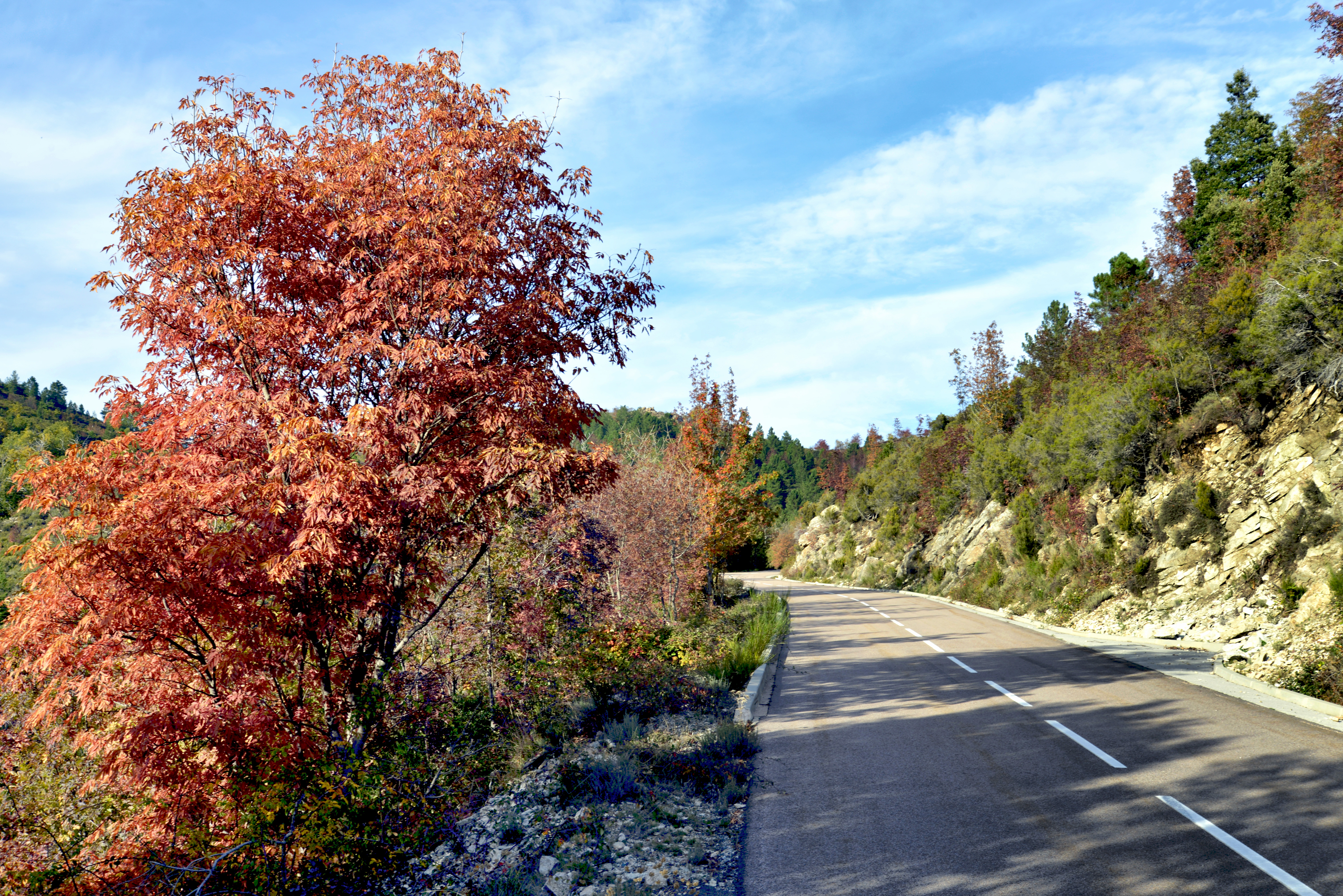 Tavera, Gravona (Corse) - La route D27 sous le col de Scalella (1193 m), fermé en hiver